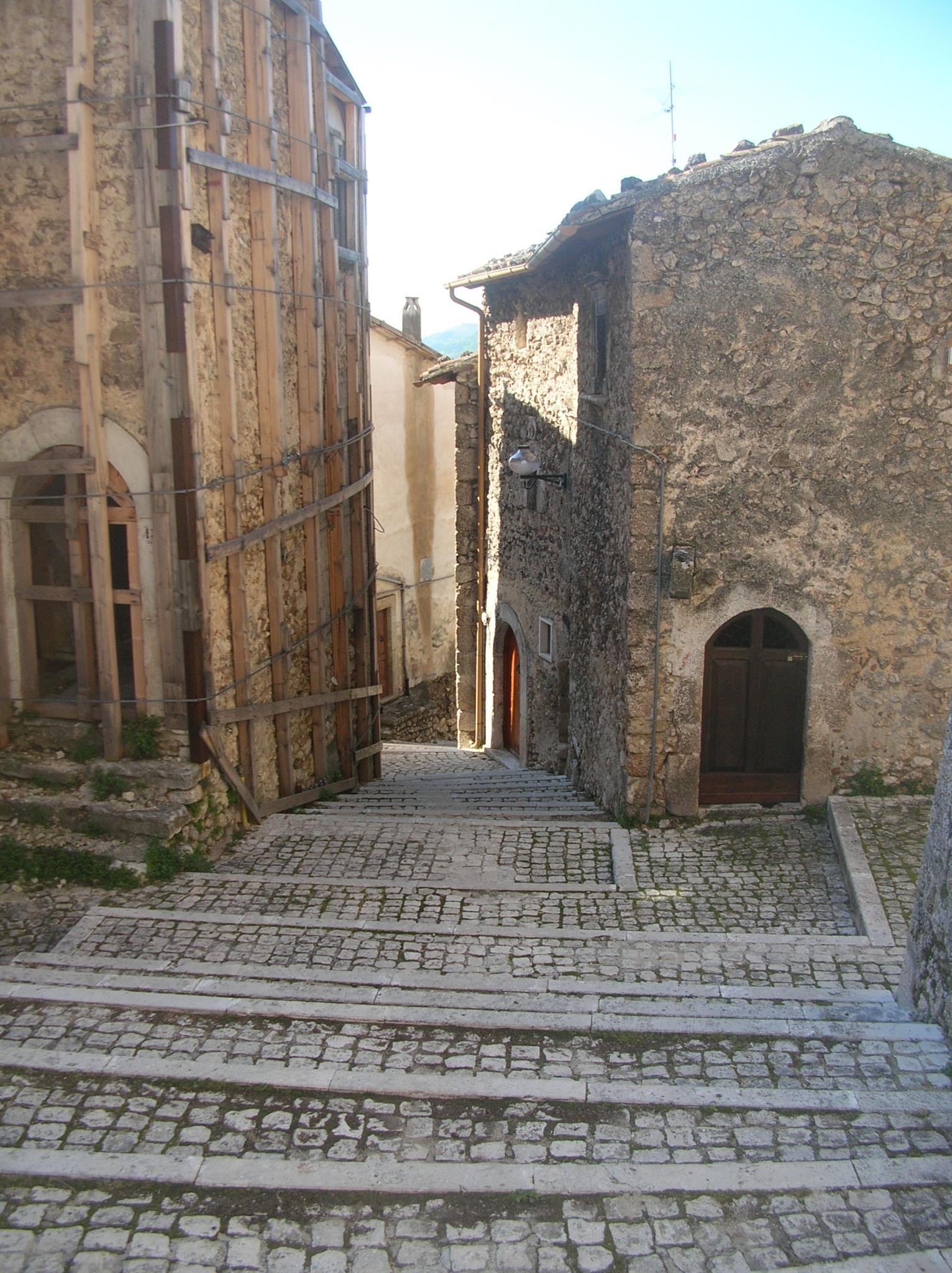 Santo Stefano di Sessanio è un comune italiano di 120 abitanti della provincia dell'Aquila in Abruzzo.